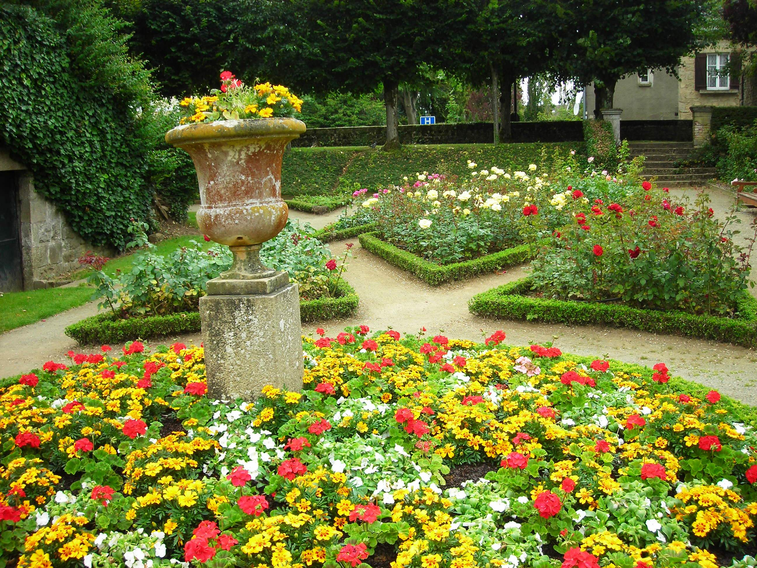 Roseraie du parc des Promenade à Alençon (Orne, France)